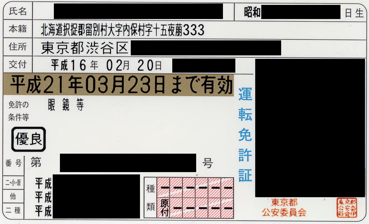 北方領土の自治体を本籍として記載した運転免許証